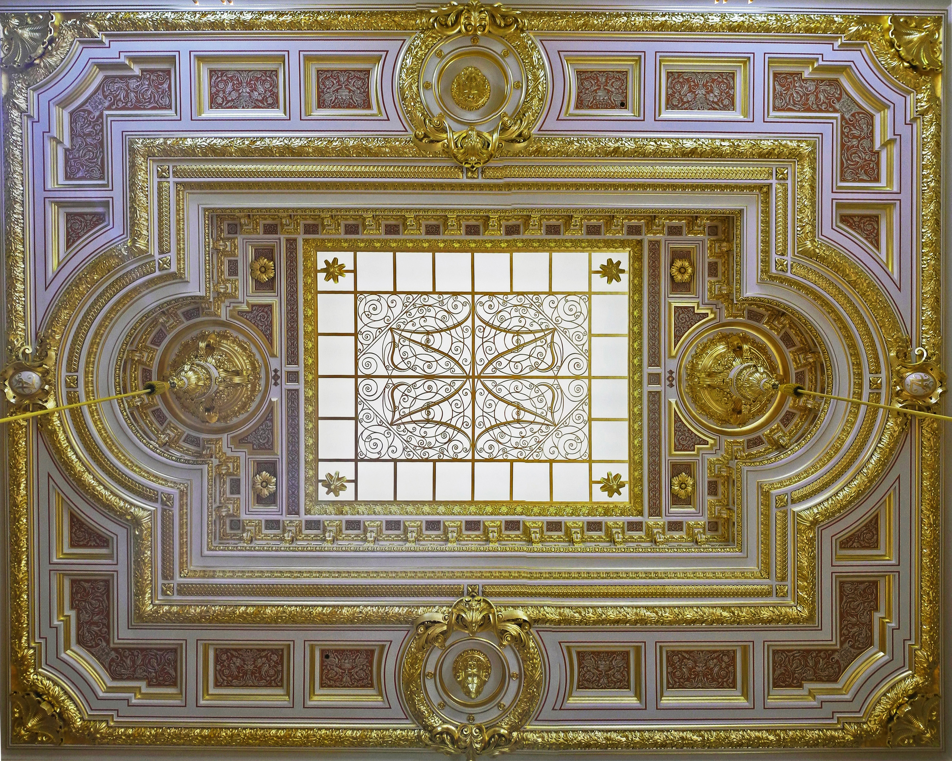 Residenzschloss Dresden – Georgenbau – Kleiner Ballsaal – Decke und Oberlicht